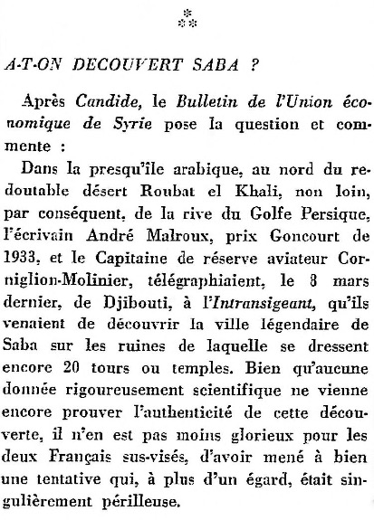 Article concernant le survol du Yémen par André Malraux et le capitaine Corniglion-Molinier au dessus de l'hypothétique capitale de la reine de Saba.